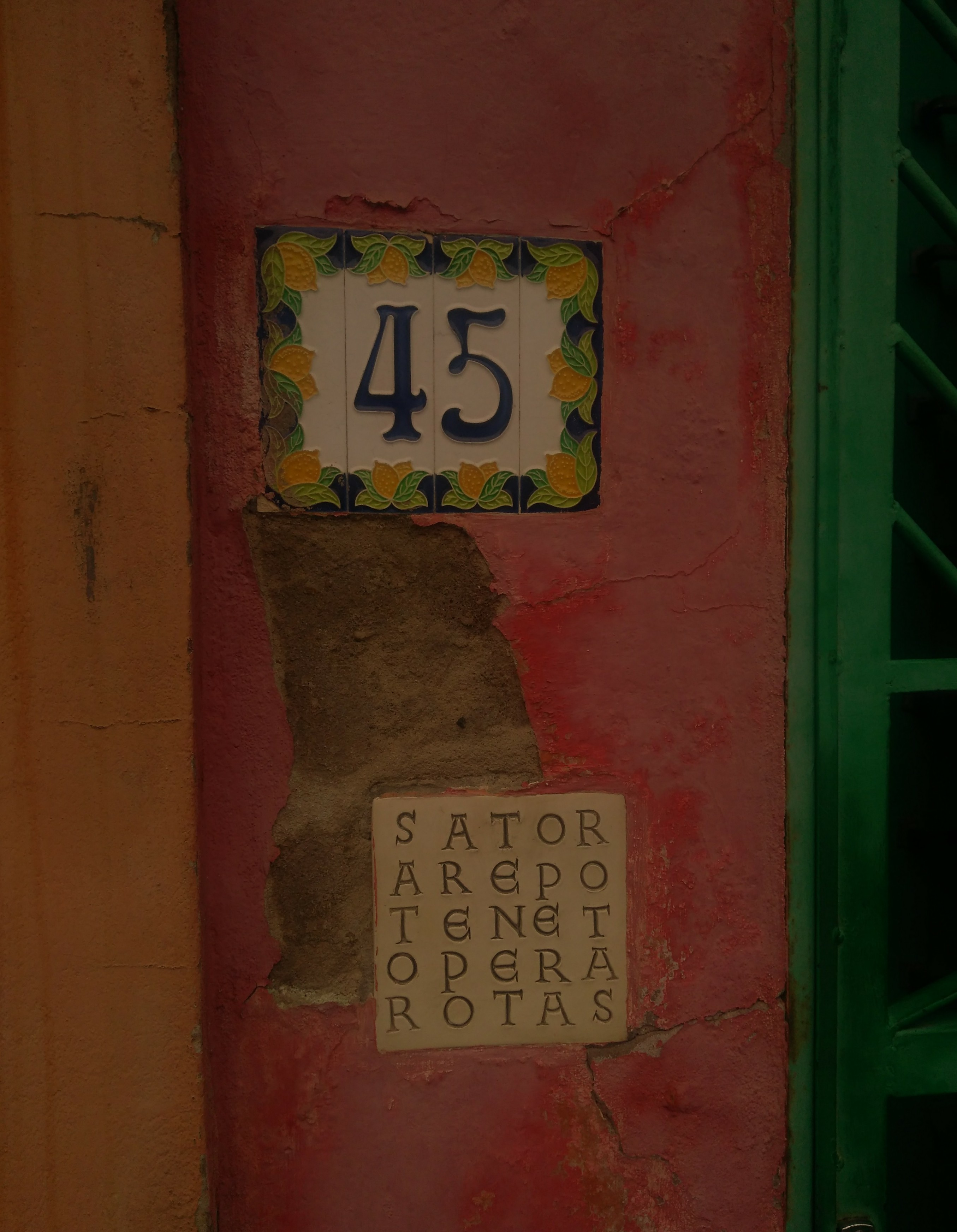 Sator Arepo Tenet Opera Rotas - Rua Dona Leonor, 45 (Porto Alegre, Brasil)